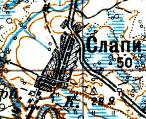 Топографическая карта Ленинградской области, квадрат Vc-29 (Батецкая), деревня Слапи